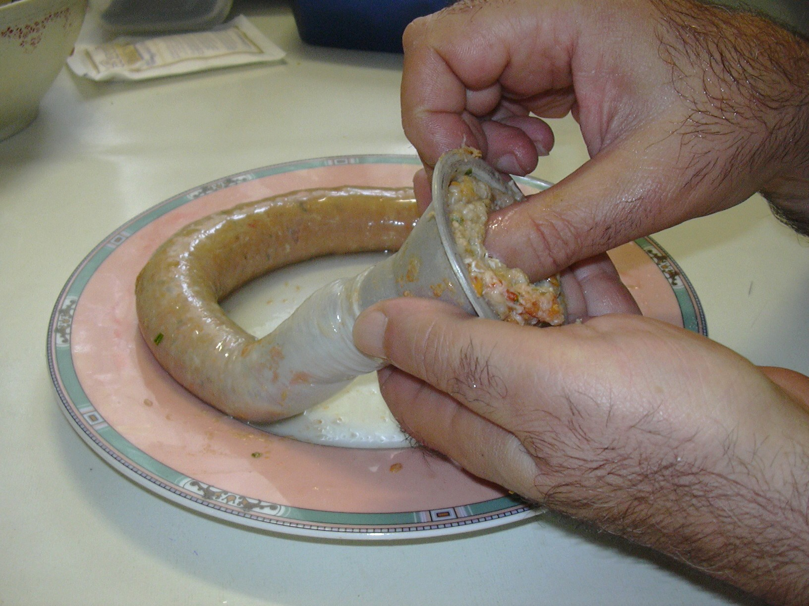 preparation manuelle d'une saucisse